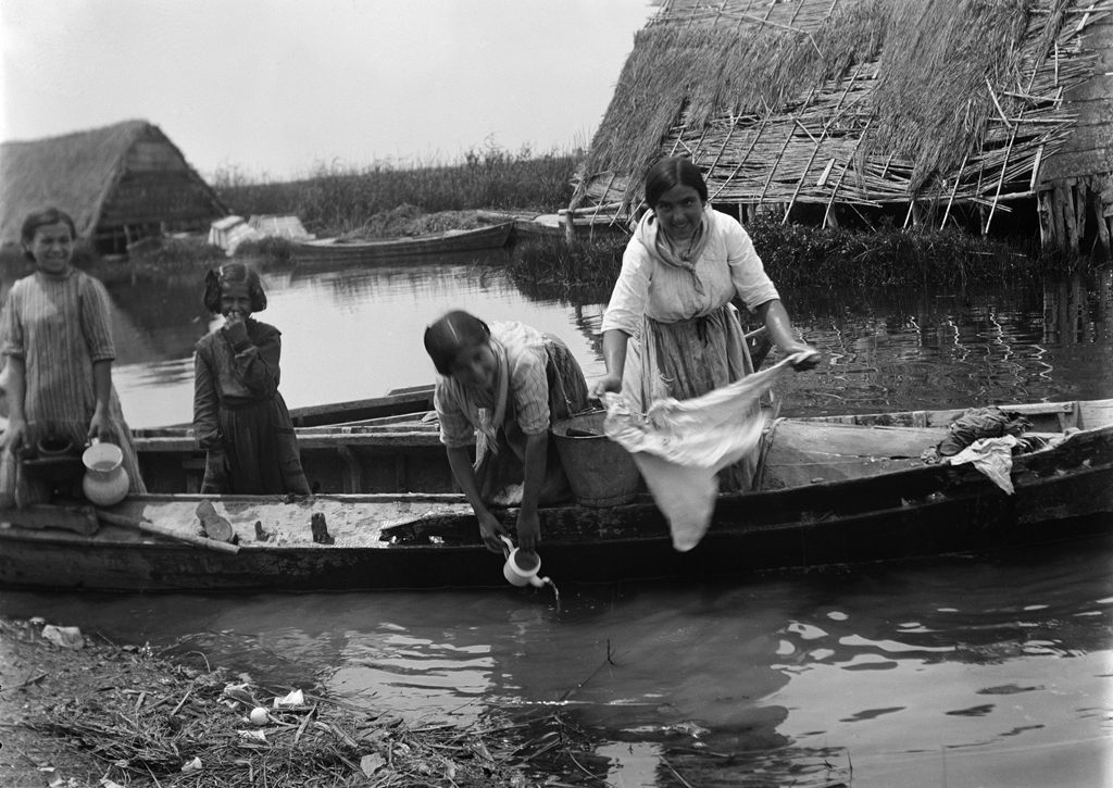 Còpia moderna del negatiu original de vidre 20 x 25 cm Llegat Dolors Moros, 2010 Museu d'Art Jaume Morera. 2808